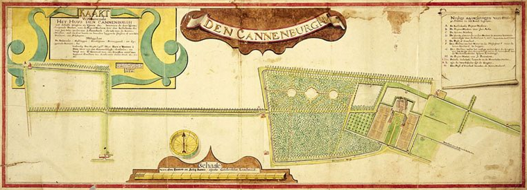 Kaart uit 1761 van landgoed Cannenburch